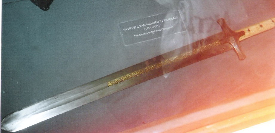 Topkapı müzesinde bulunan Fatih 'in İstanbulu fethederken kullandığı kılıcı